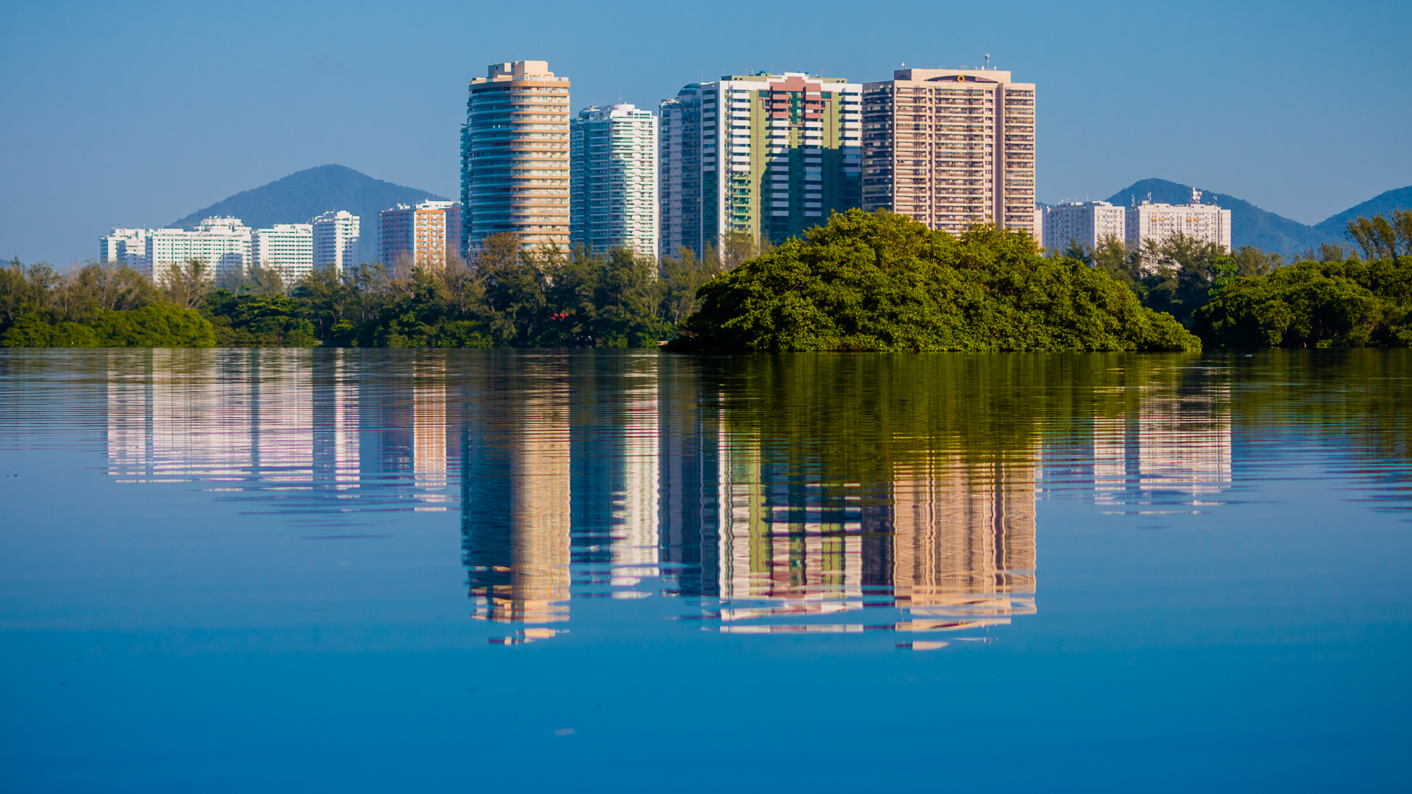 Lagoa da Reserva de Marapendi